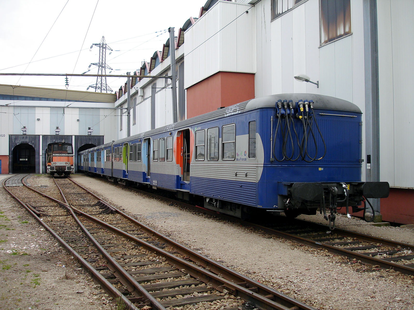 Rame inox de banlieue (RIB) au technicentre Paris Nord-Joncherolles, Villetaneuse, Seine-Saint-Denis, France.